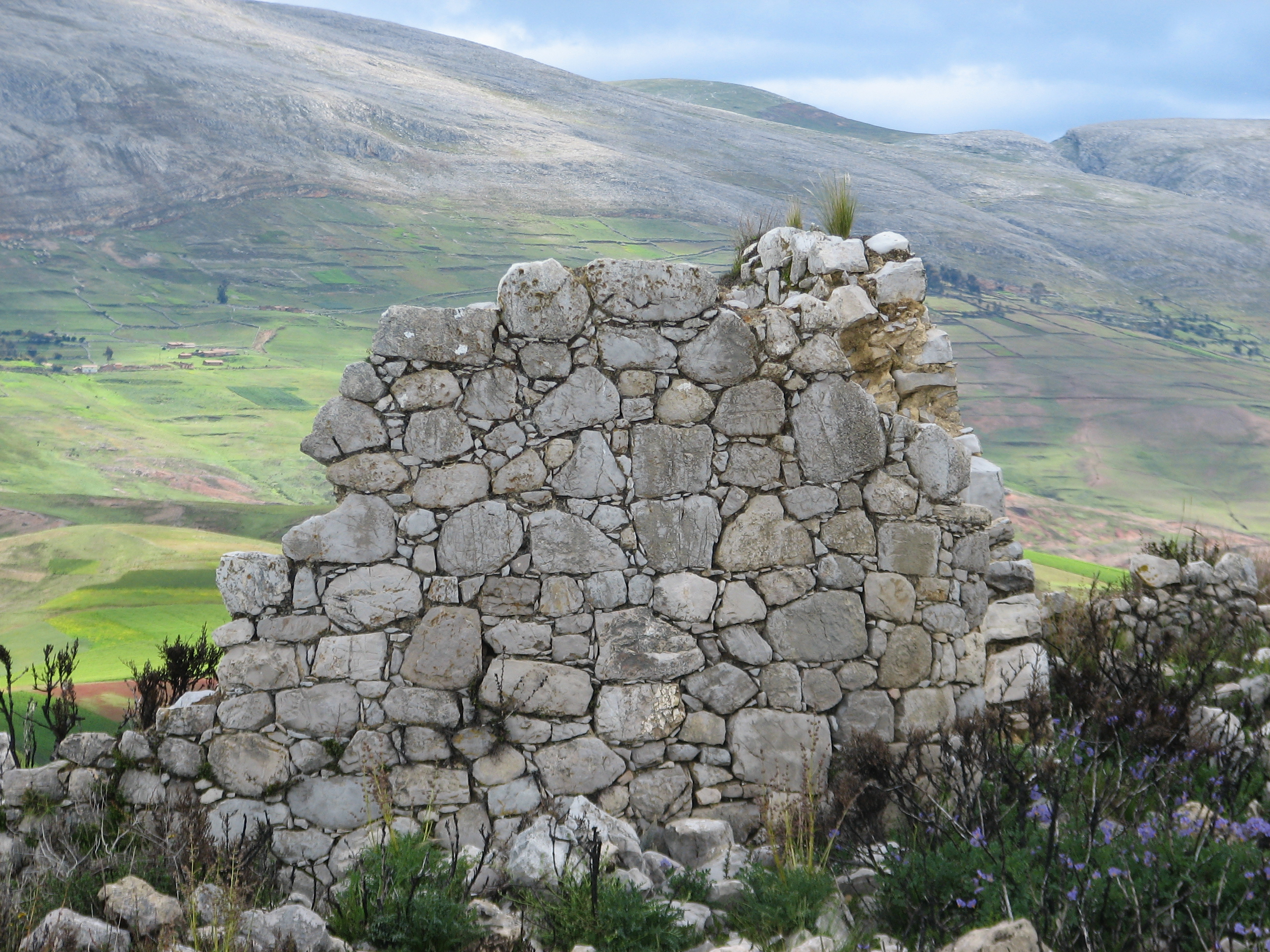 Tunanmarca Archaeological site (wall)